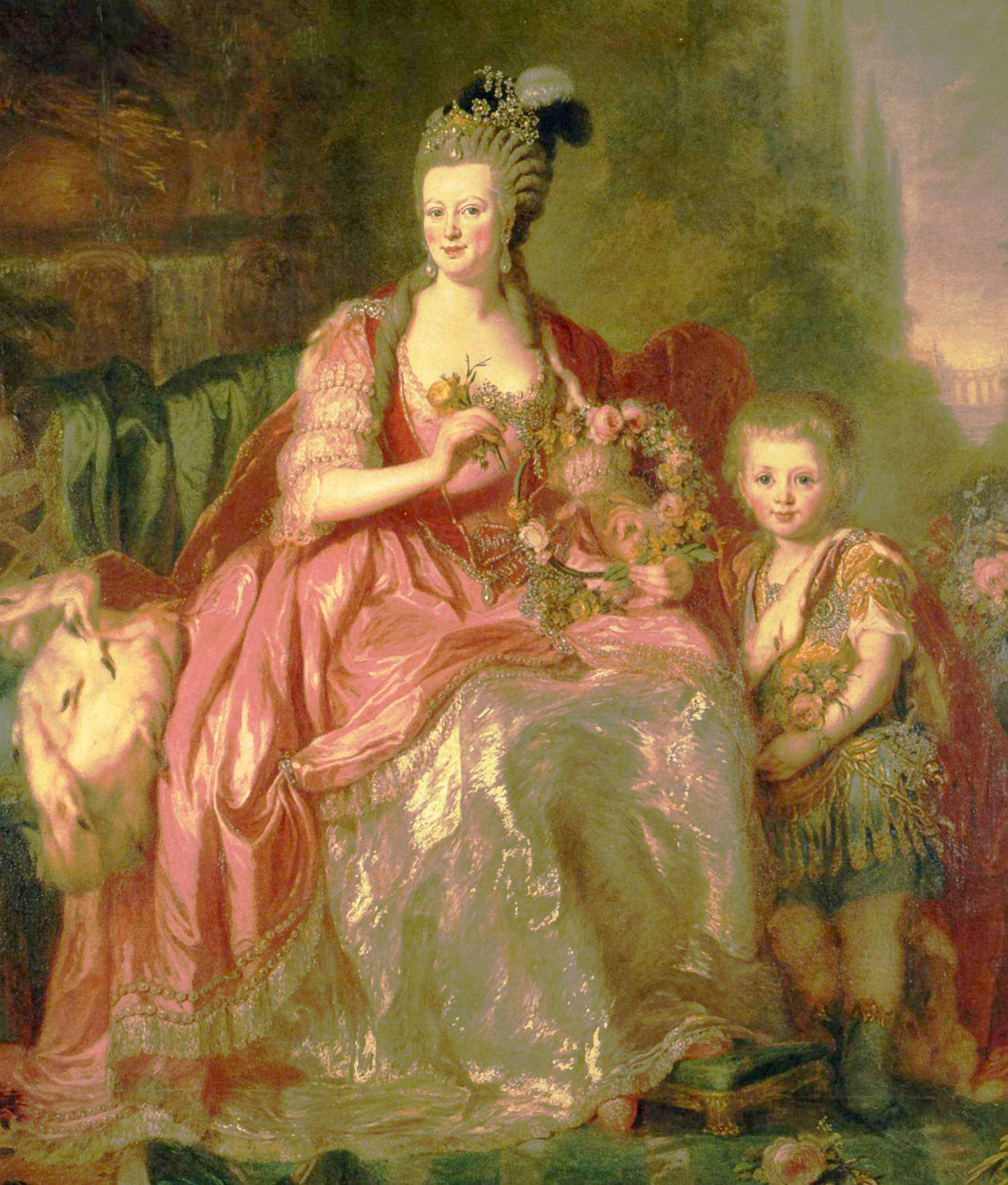 Friederike Luise von Hessen-Darmstadt, Prinzessin von Preußen, mit dem Thronfolger Friedrich Wilhelm (III.). Stiftung Preußische Schlösser und Gärten, GK 1 11700